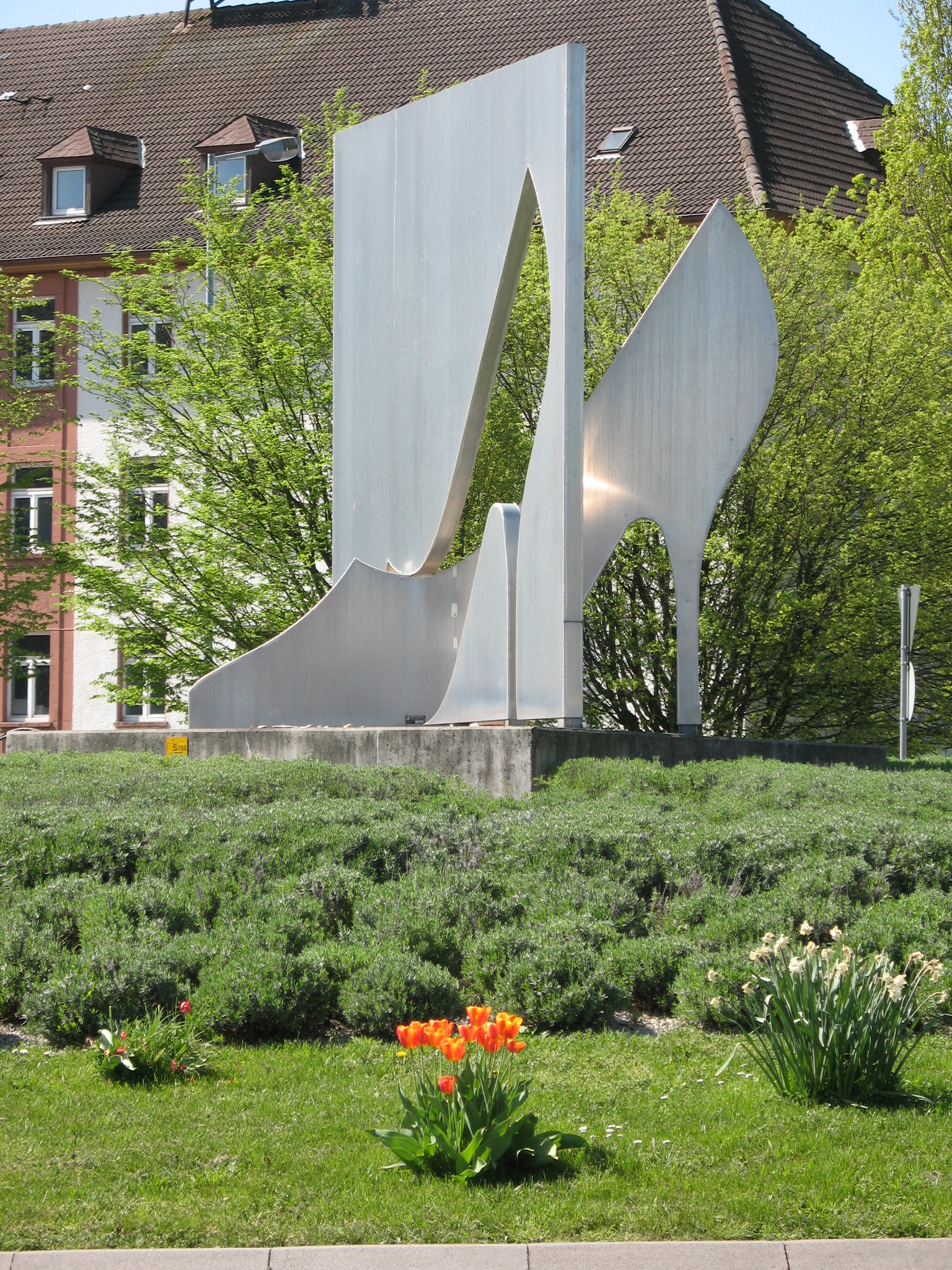 Das Foto zeigt ein Kunstwerk am Orsteingang von Pirmasens aus Richtung Rodalben komment. Es steht in der Mitte eines Kreisels.